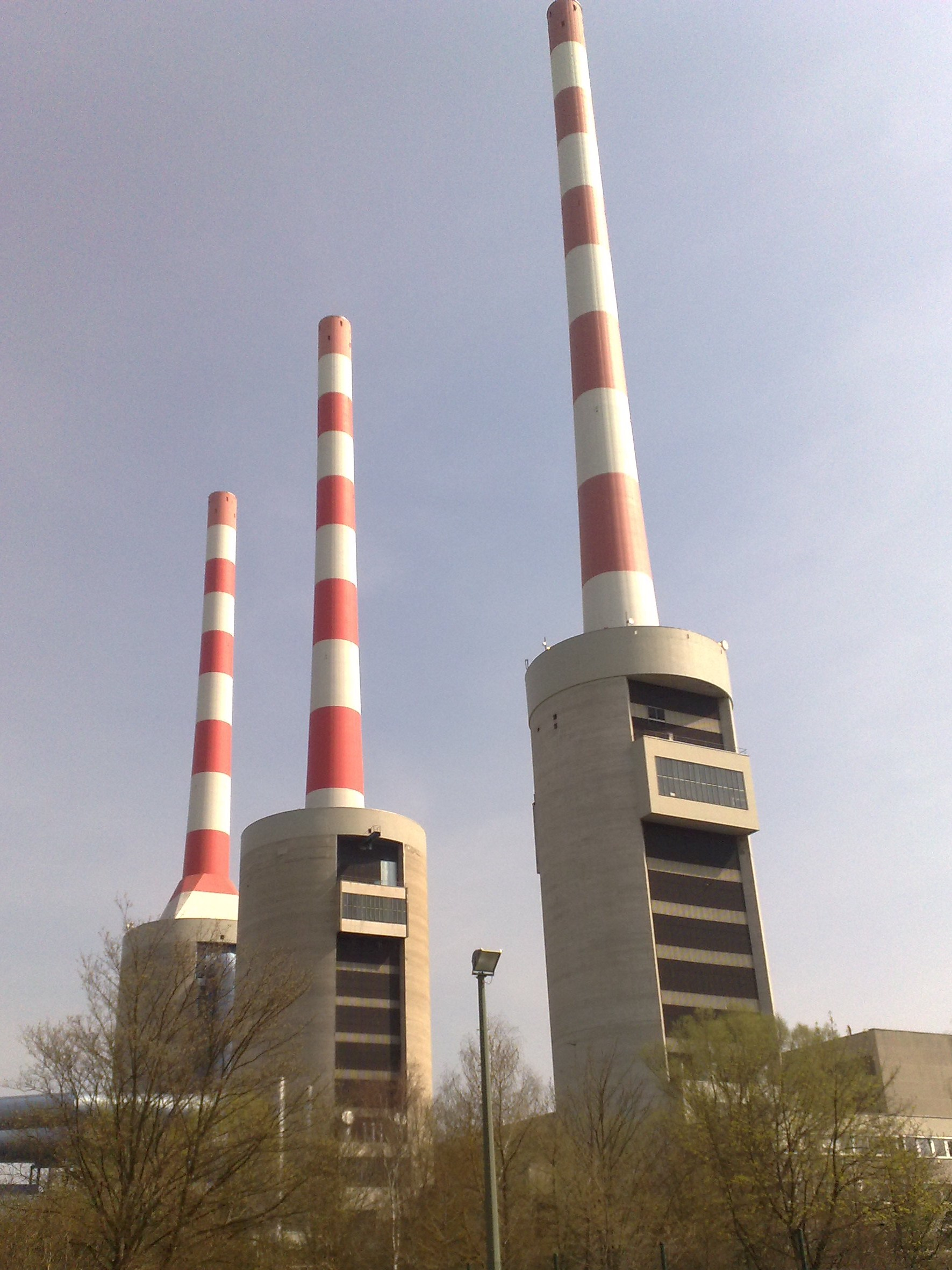 Eon Kraftwerk Irsching 1.